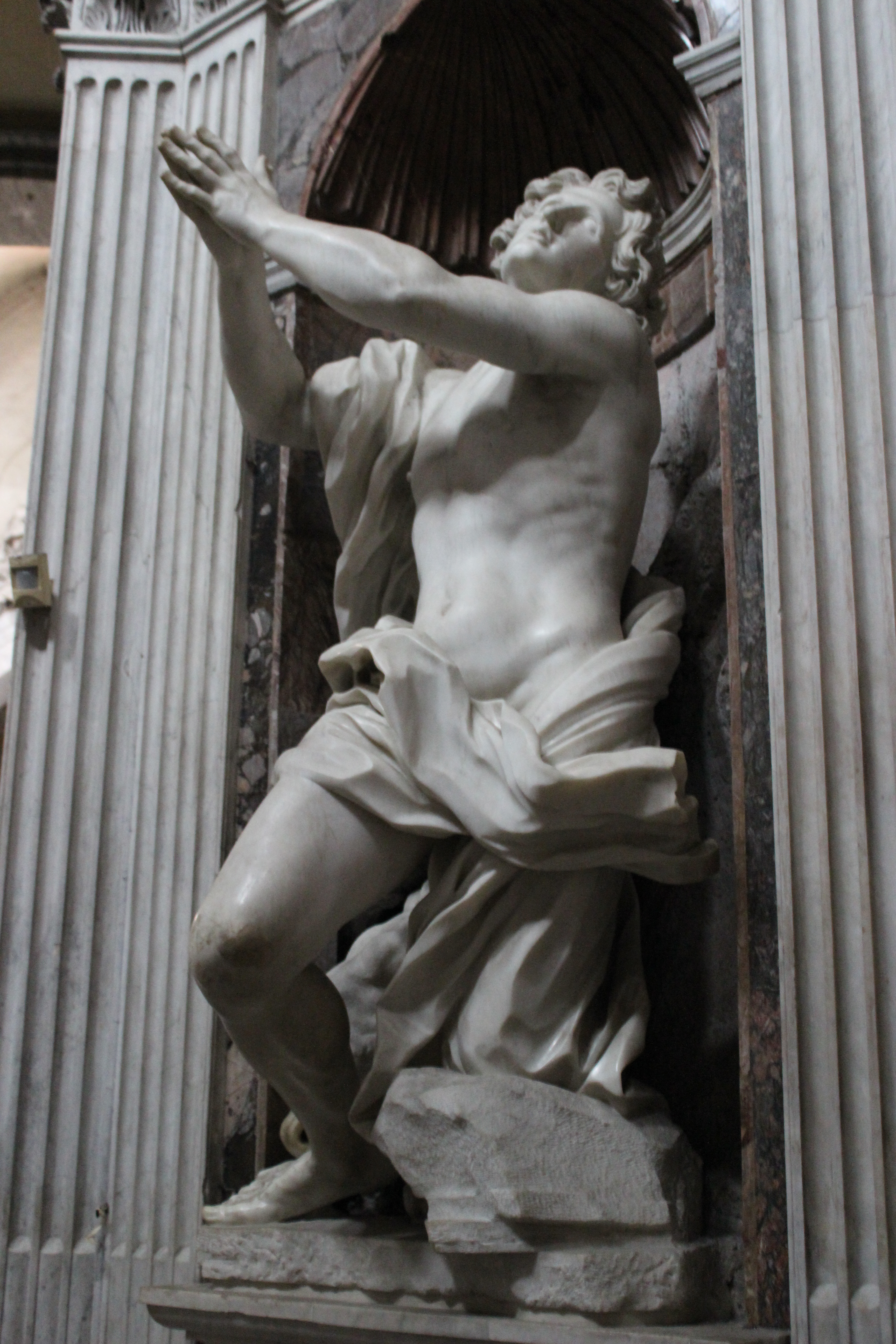 Roma. Santa Maria del Popolo. Capilla Chigi. Daniel por G.L. Bernini.